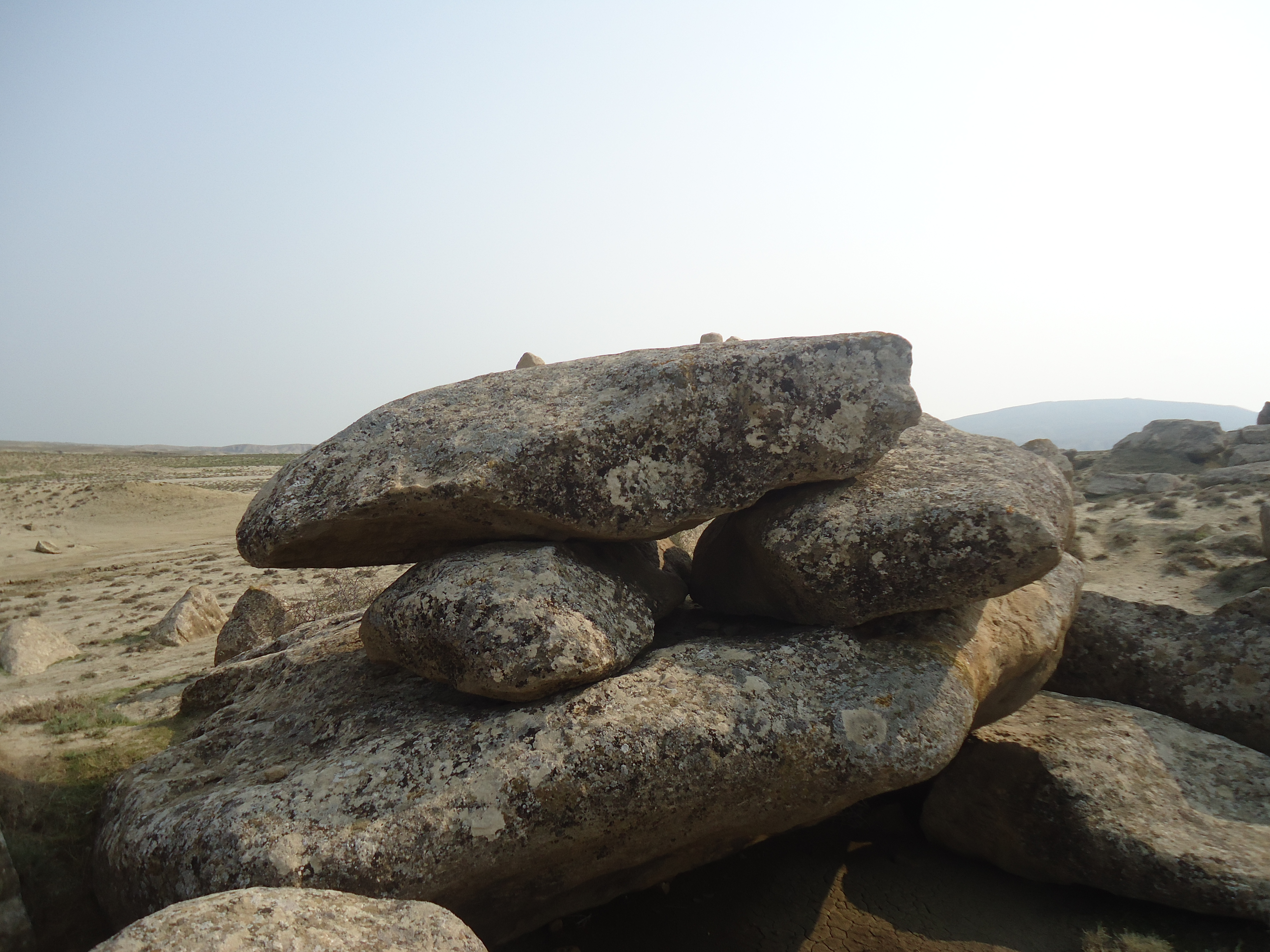 Qaval daşından qədim musiqi aləti Qobustanda iki ədəddir. Bunlardan birincisi Cingirdağın şimal-şərq ətəyindədir. O Cingirdağ - Yazılıtəpə qədim qayaüstü təsvirlər kolleksiyası üzrə 114 №-li daş kimi qeydə alınmışdır. Cingirdağdakı birinci Qavaldaş ortada 70 sm qalınlığında, şərq tərəfdə getdikcə nazikləşən (uzunluğu 270, eni 200 sm) yastı qaya parçasıdır.